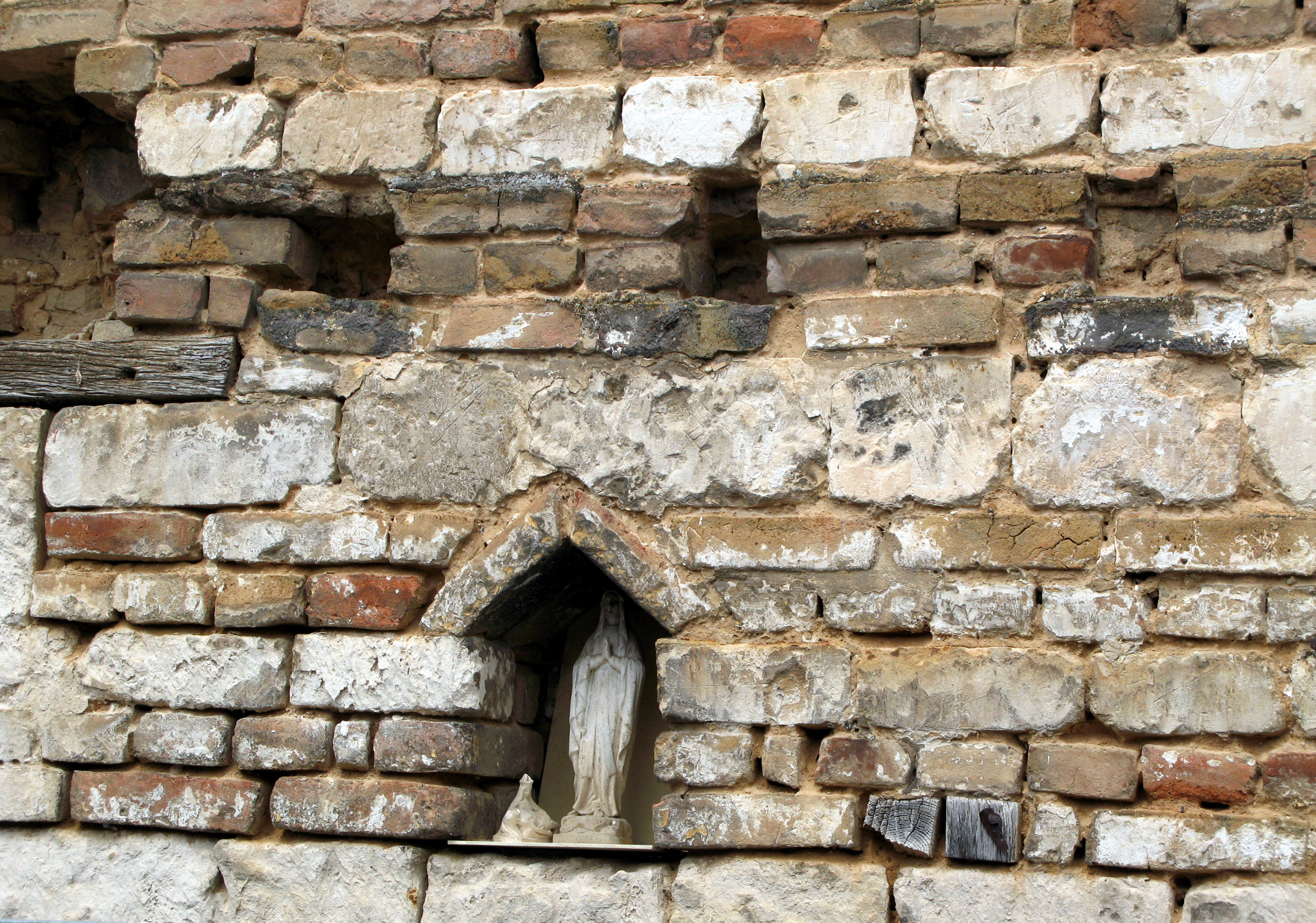 Picquigny (Somme, France) - Niche de mitoyenneté dans une propriété (cour d'un ancien artisan) non loin de la Somme.